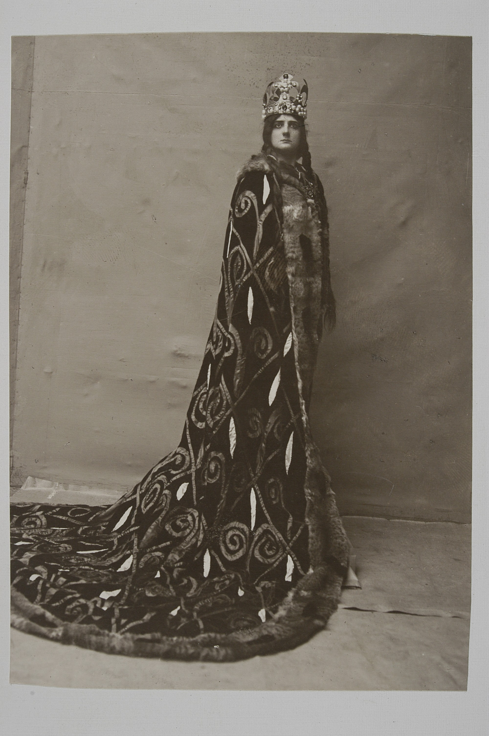 Stanisława Wysocka w roli tytułowej w "Balladynie" Juliusza Słowackiego, fotografia wykonana w 1915.